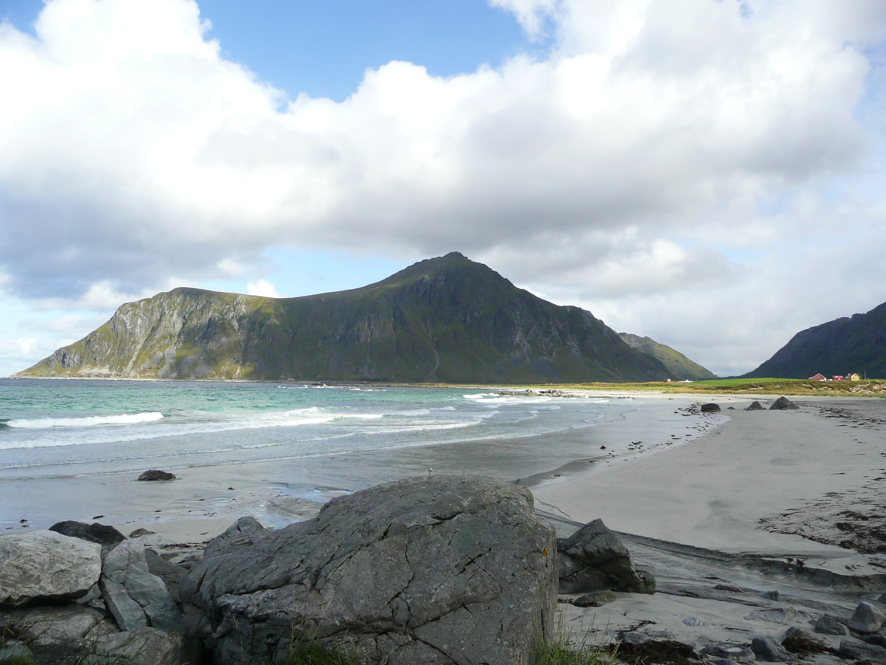 Flakstadsanden, Flakstad, Lofoten, Norway.